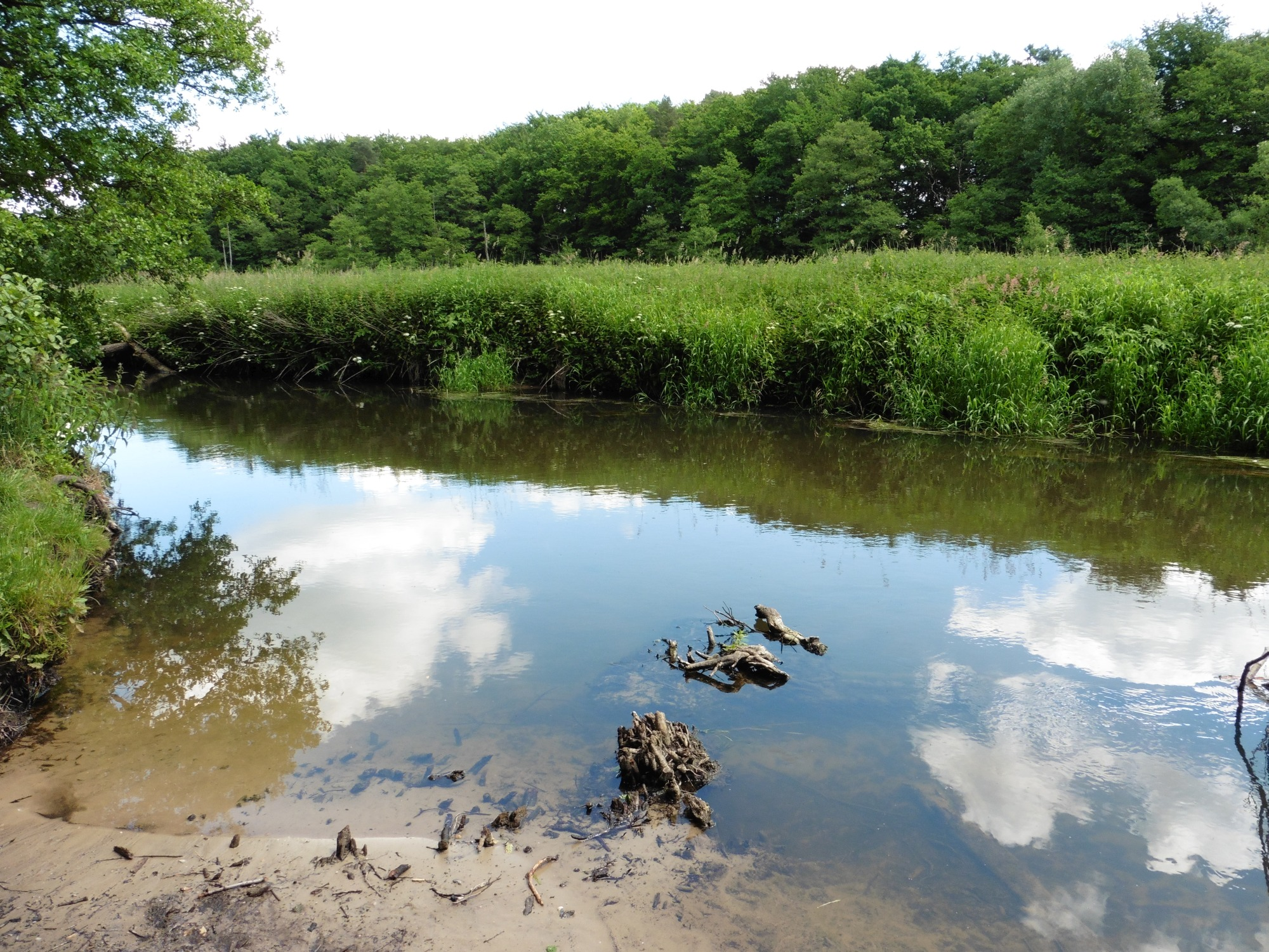 Die Bille im Vorwerksbusch bei Reinbek ("Liebesbuche"); Bereich im NSG „Billetal“